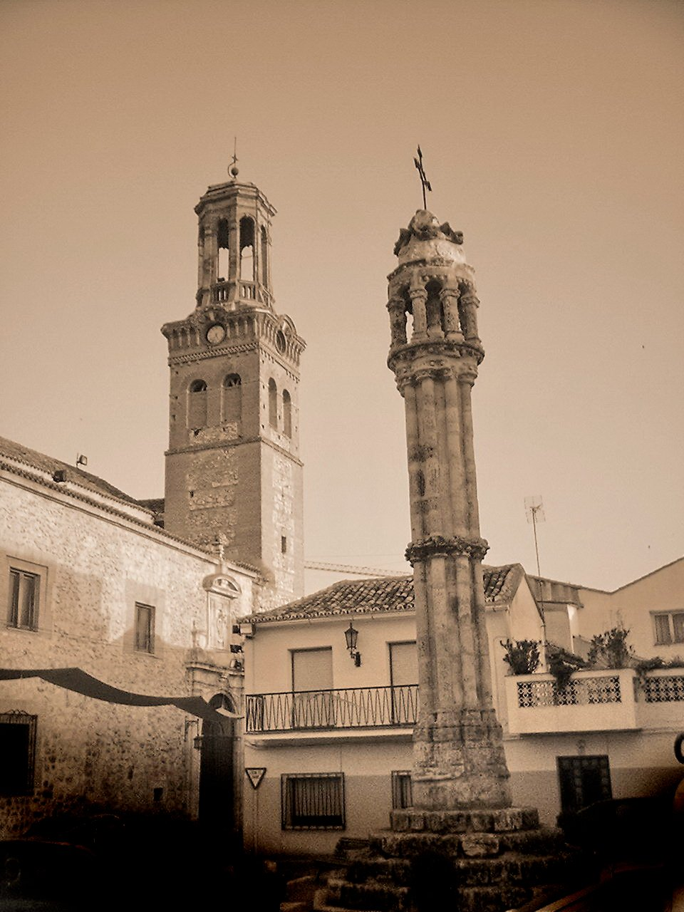 Hiszpania, Kastylia-La Mancha, Toledo, Stół Okani (Mesa de Ocańa), Ocańa, Pręgierz